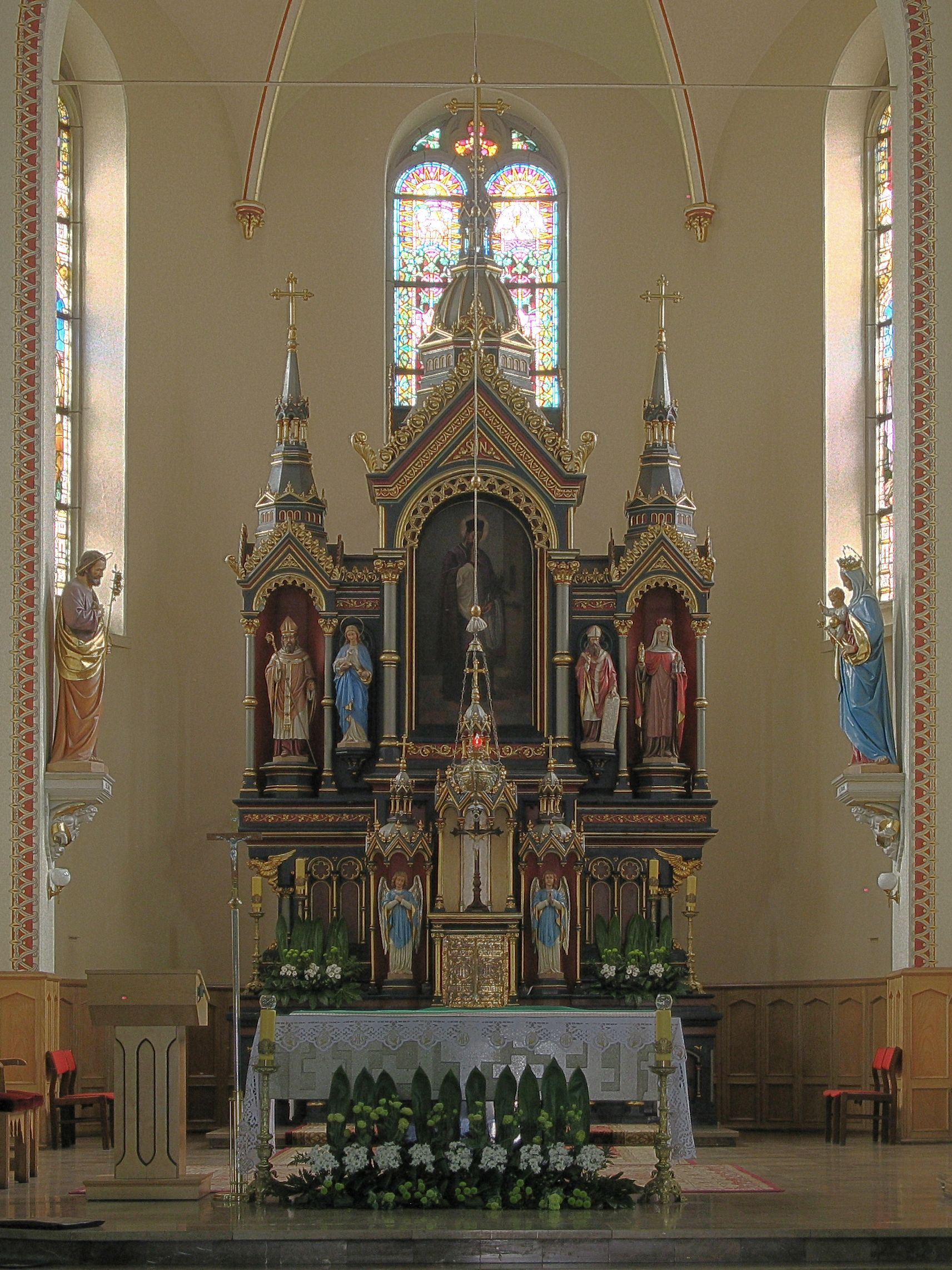 Kościół św. Jana Nepomucena w Bytomiu-Łagiewnikach, ołtarz główny.